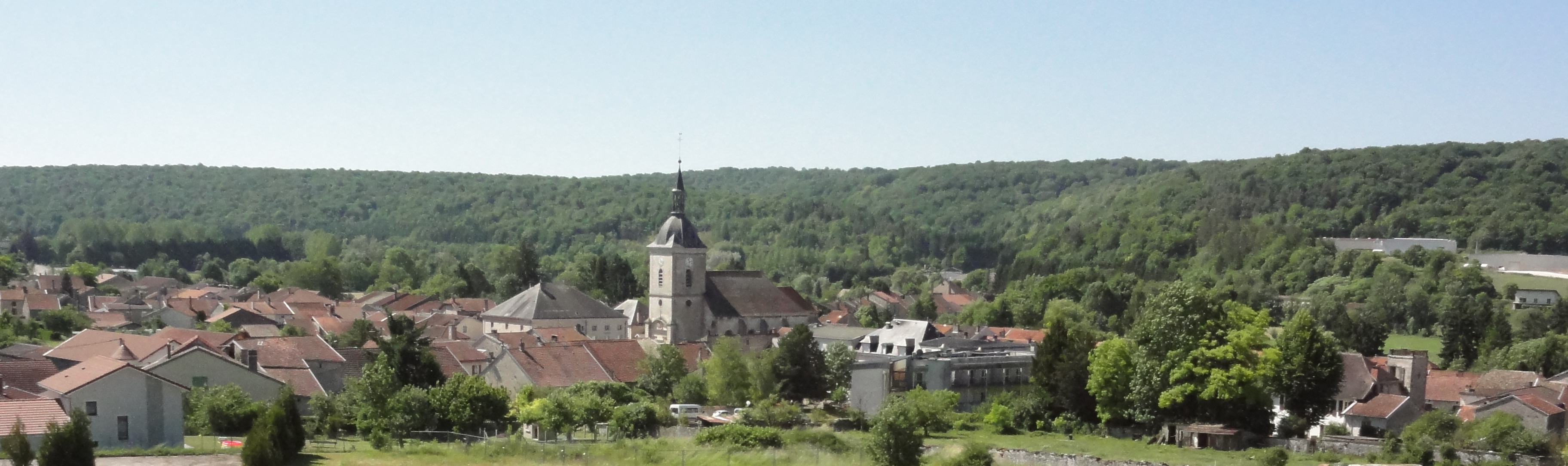 Doulaincourt, vue panoramique village et forêt